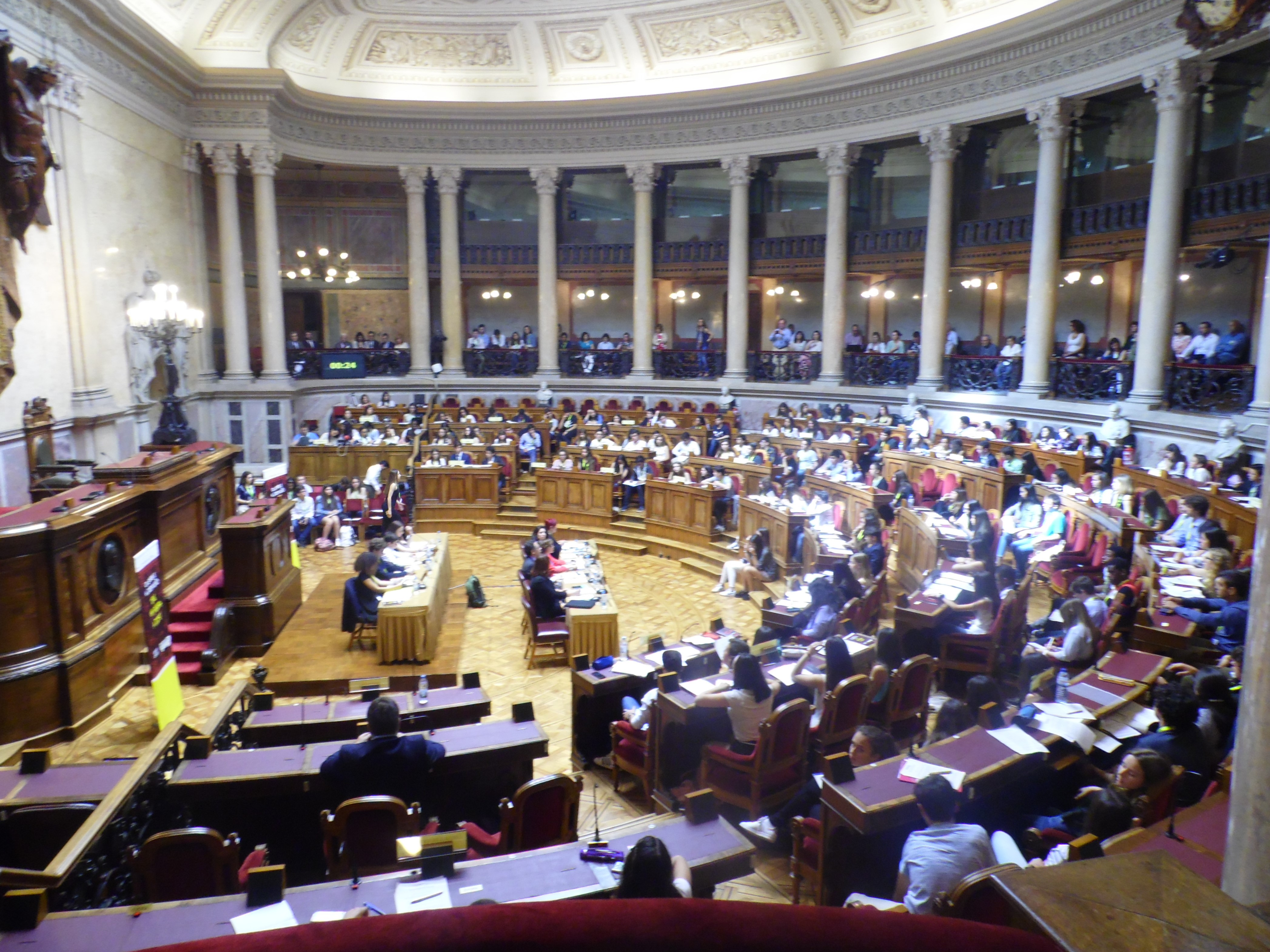 Sessão Nacional do Parlamento dos Jovens, do Ensino Básico na Sala do Senado da Assembleia da República Portuguesa (2017)